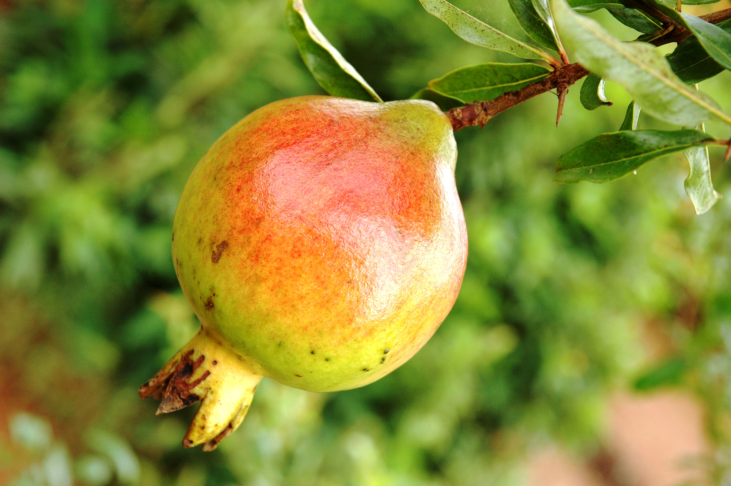 Pomegranite Fruit Photo Credit: Shiva shankar Location: karkala, Karnataka